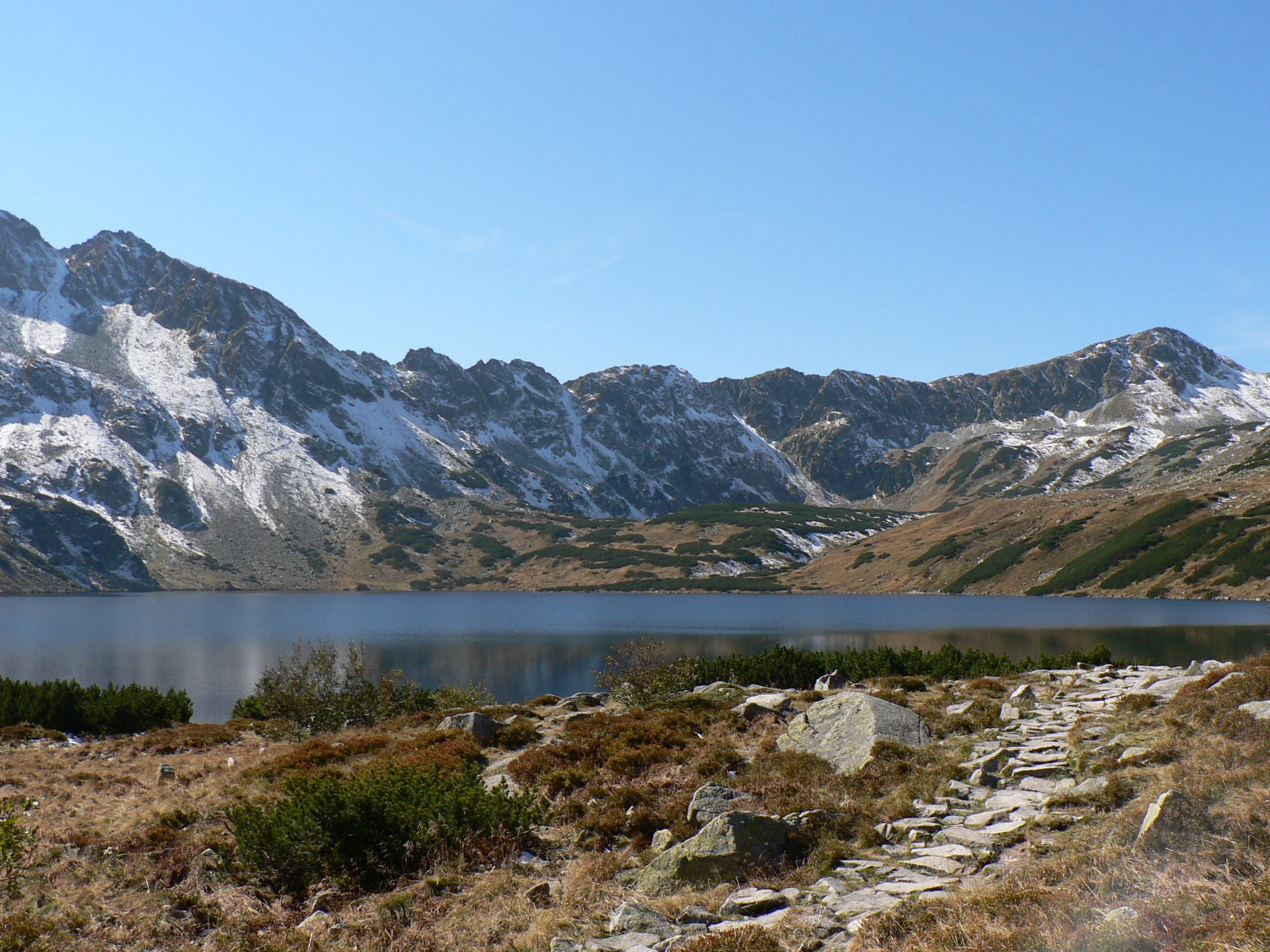 Wielki Staw w Dolinie Pięciu Stawów Polskich, w tle Niżni Kostur, Kotelnica, Gładki Wierch